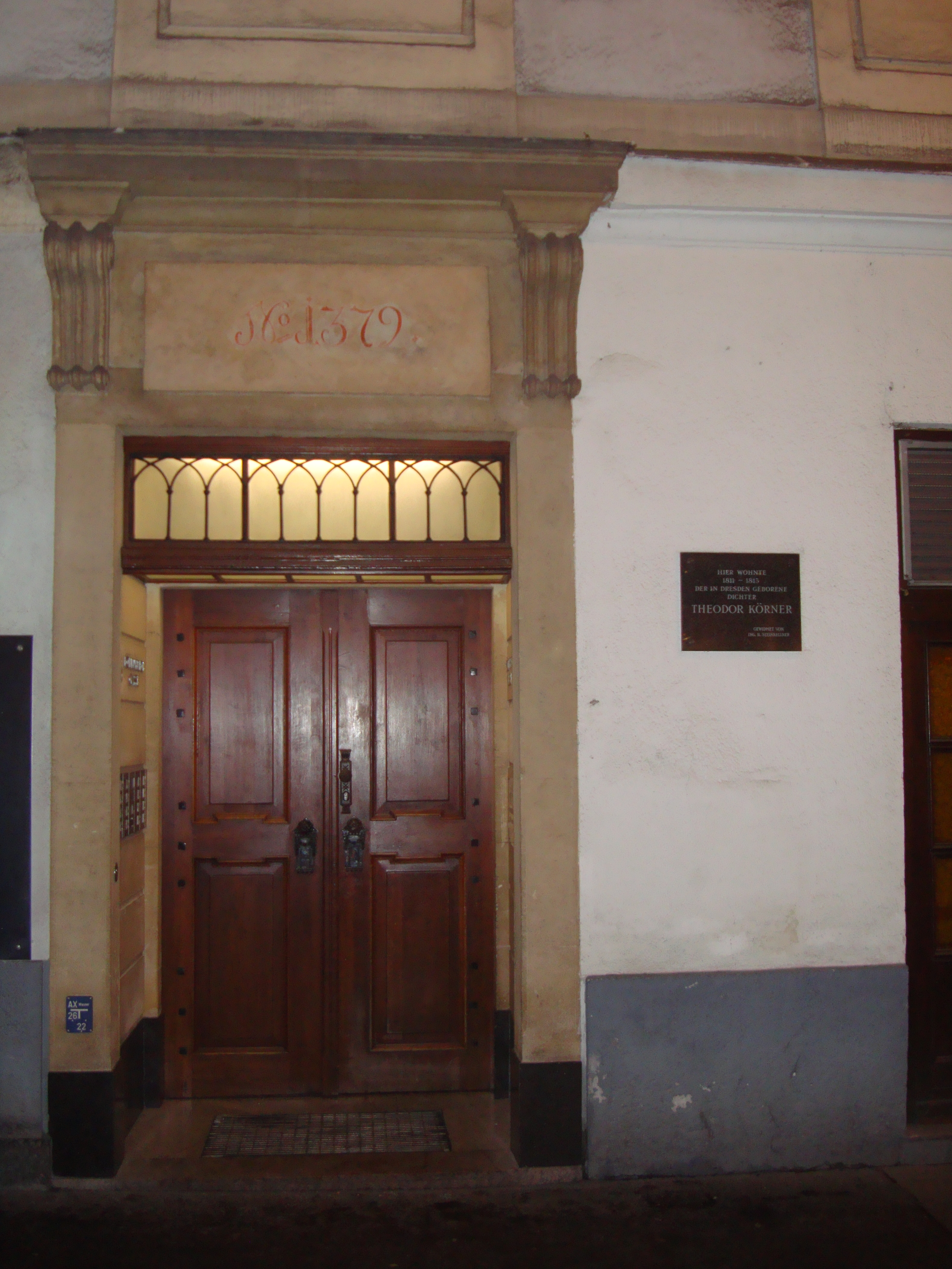 Gedenktafel Theodor Körner (1791-1813) Wien 2